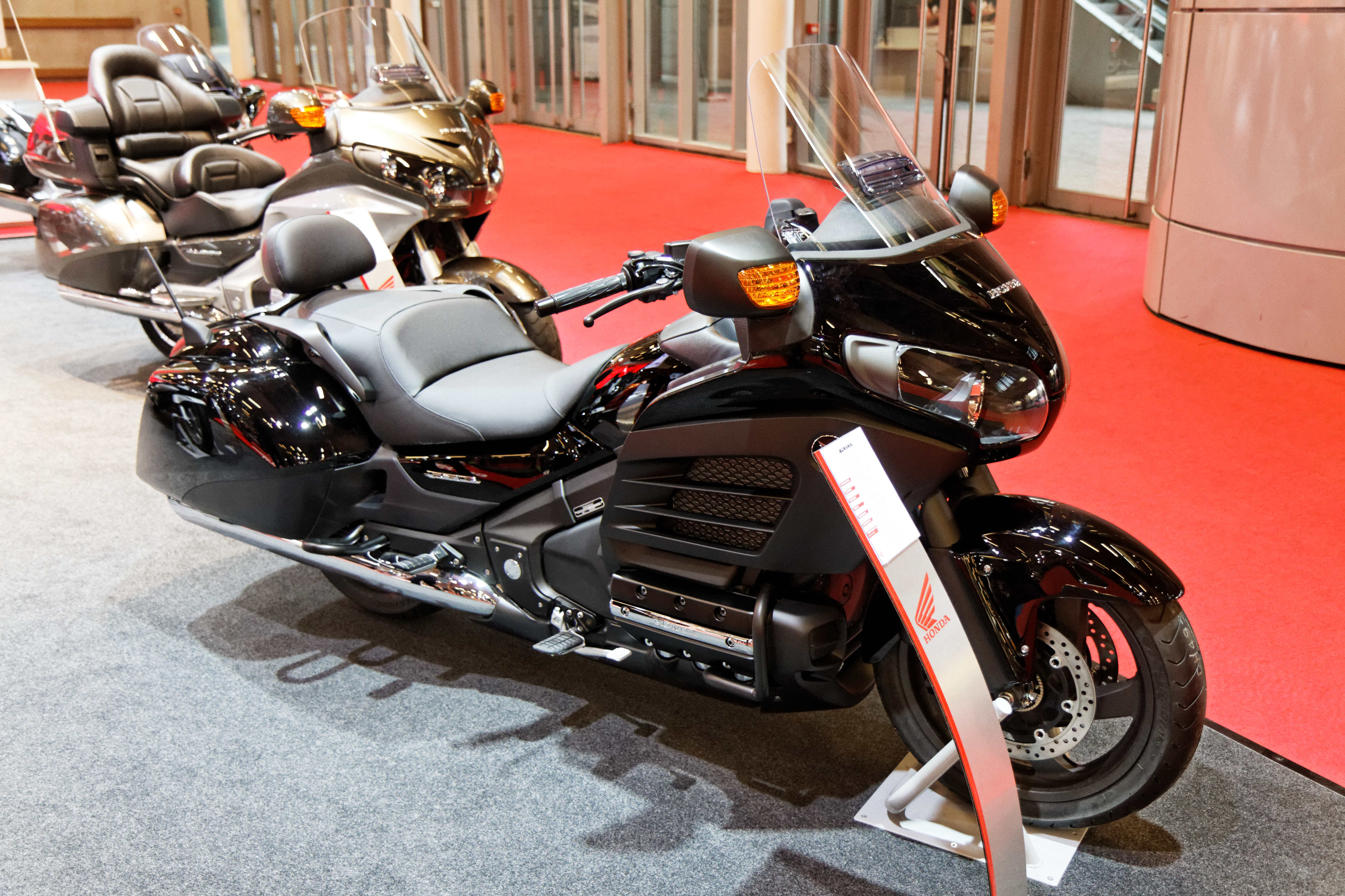 Une Honda F6B présentée lors du salon de la moto 2013.